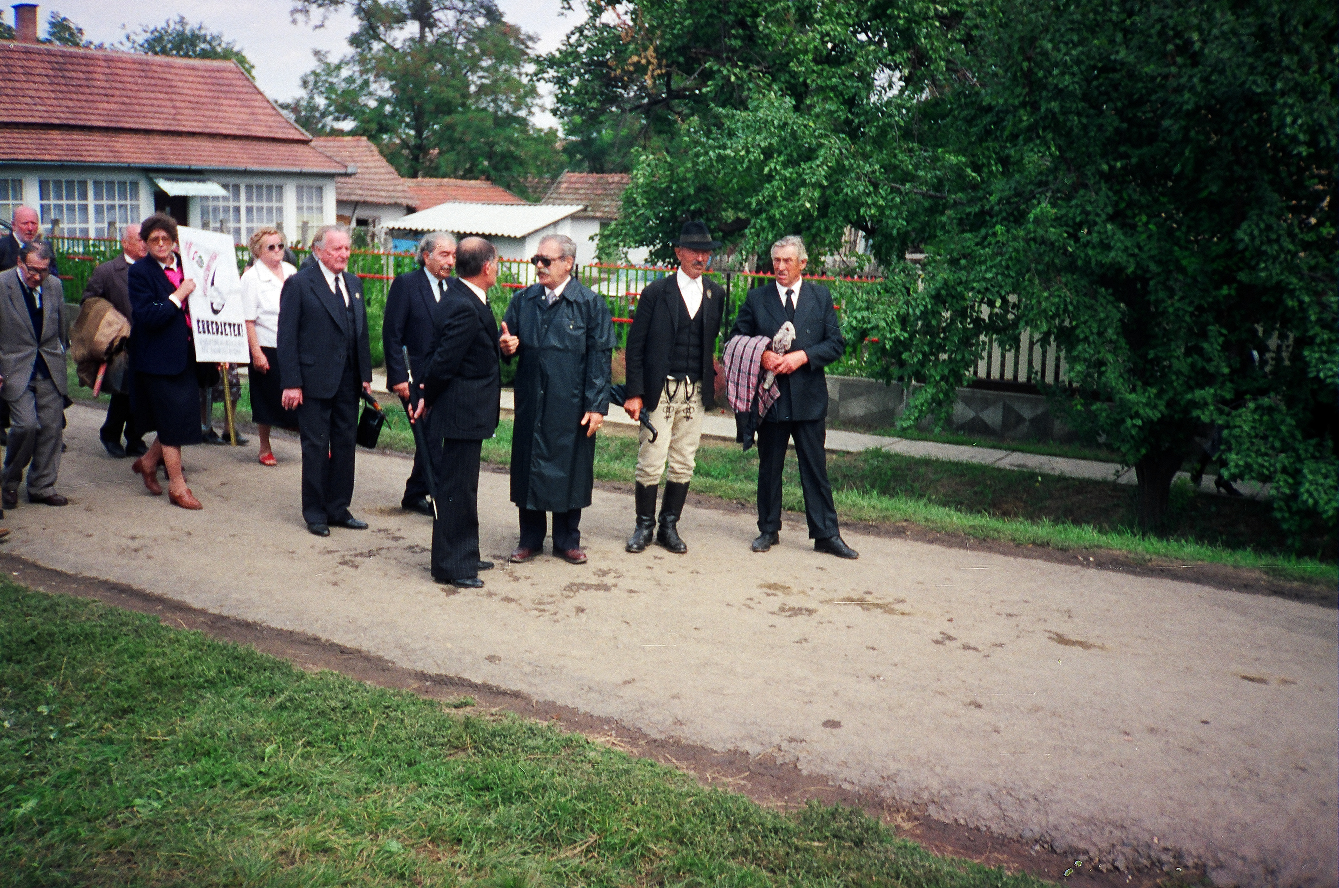 A felvétel 1993. szeptember 4 –én készült Kenderesen. Vitéz nagybányai Horthy Miklós, a Magyar Királyság kormányzója újratemetésén mintegy ötvenezren vettek részt. A család tagjai, Boross Péter, Für Lajos, Surján László, Balsai István, Kádár Béla, Nagy Ferenc József, Szabó Tamás, Torgyán József, Kiss Gyula, Lezsák Sándor, Nahimi Péter, Kónya Imre, Csurka István, Vörös Vince, Gáspár Miklós, Zacsek Gyula, Miklós Árpád, Szilasy György, Király B. Izabella, Horváth Béla, Dénes János, Antall József felesége és fia. Radnóczy Antal, a Vitézi Rend főkapitánya tisztelgett a rendjüket alapító Horthy Miklósnak. Ezt követte Baranyi Mihály polgármester beszéde. Kéri Kálmán nyugalmazott vezérezredes egyre fogyatkozó számú tiszttársa nevében beszélt. Emlékbeszédet tartott Hegedűs Lóránt püspök, a Magyarországi Református Egyház Zsinatának lelkészi elnöke is. Edelsheim-Gyulai Ilona grófnő, néhai Horthy István kormányzó helyettes felesége köszönetet mondott azoknak, akik az újratemetést lehetővé tették, s tisztelegtek az elhunyt emléke előtt. Ifjabb Horthy István felidézte nagyapja emlékét. Az újratemetés záróaktusaként a gyülekezet elénekelte a Himnuszt. Források: Gr. Edelsheim Gyulai Ilona Horthy István kormányzóhelyettes özvegye: Becsület és kötelesség I-II. Bp.,1998, Szöts Zoltán Oszkár: A rendszerváltás nyomtatott sajtója és Horthy Miklós újratemetése (1989–1994) Gondolatok Horthy Miklósról (válogatás, második kiadás) Horthy Miklós újratemetése (1-6) Horthy Miklós újratemetése Kenderesen 1993: magánember-miniszterekkel temetik újra Horthy Miklóst The Soldier Who Saved the Lives of Budapest ’s : Col. Ferenc Koszorús Koszorús Ferenc Emlékiratai és Tanulmányainak Gyűjteménye, Sajtó alá rendezte: Koszorús Ferenc özvegye, Varsa Istvánné, Kiadta: Magyar Történelmi Kutató Társaság, Universe Publishing Company, 1987, ISBN 0-935484-17-5, Varsa István Címkék: Horthy Miklós Kenderes 1993 Metapolisz